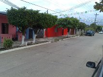 Una calle en el municipio de Jaltipan